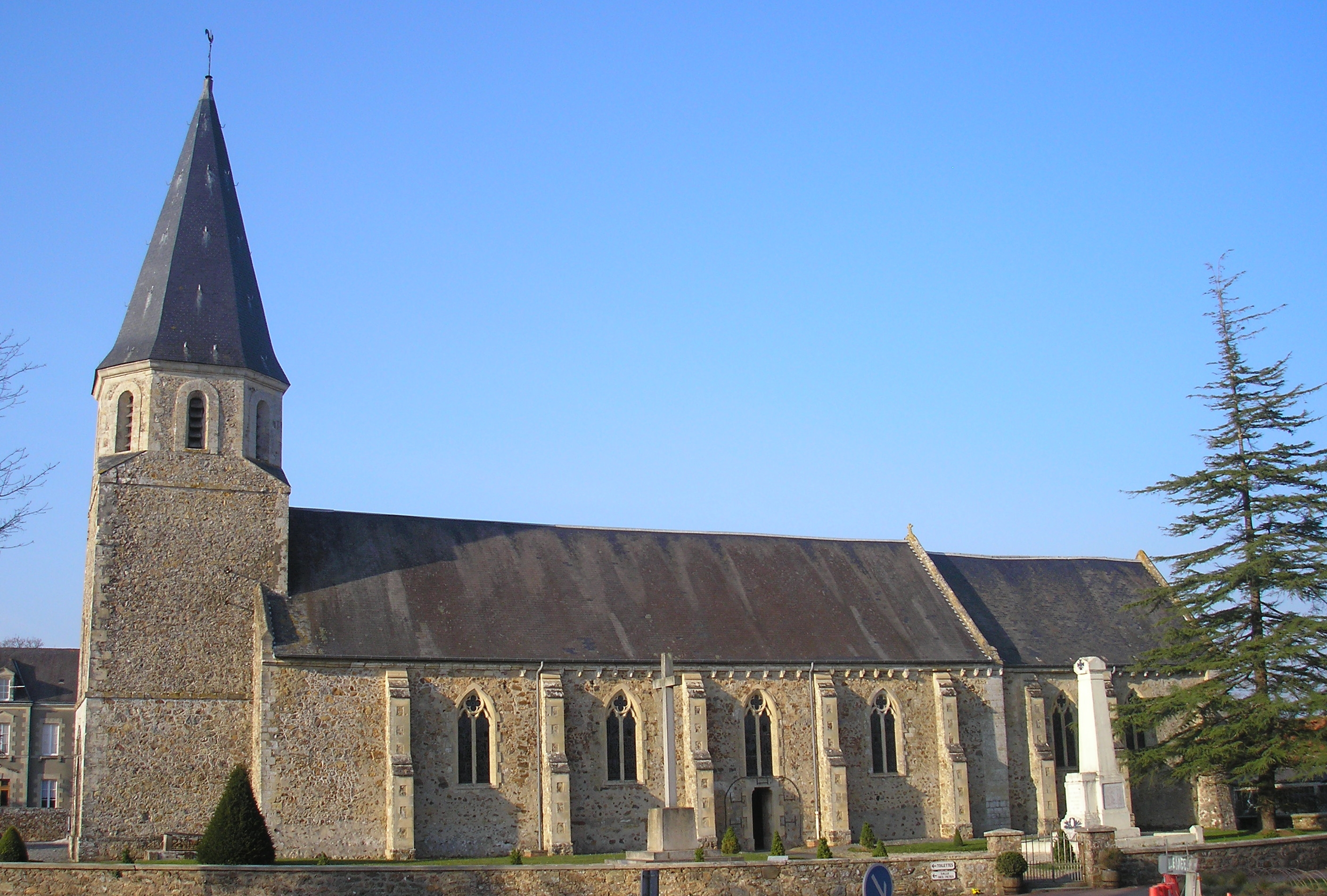 Le Dézert (Normandie, France). L'église Saint-Martin.